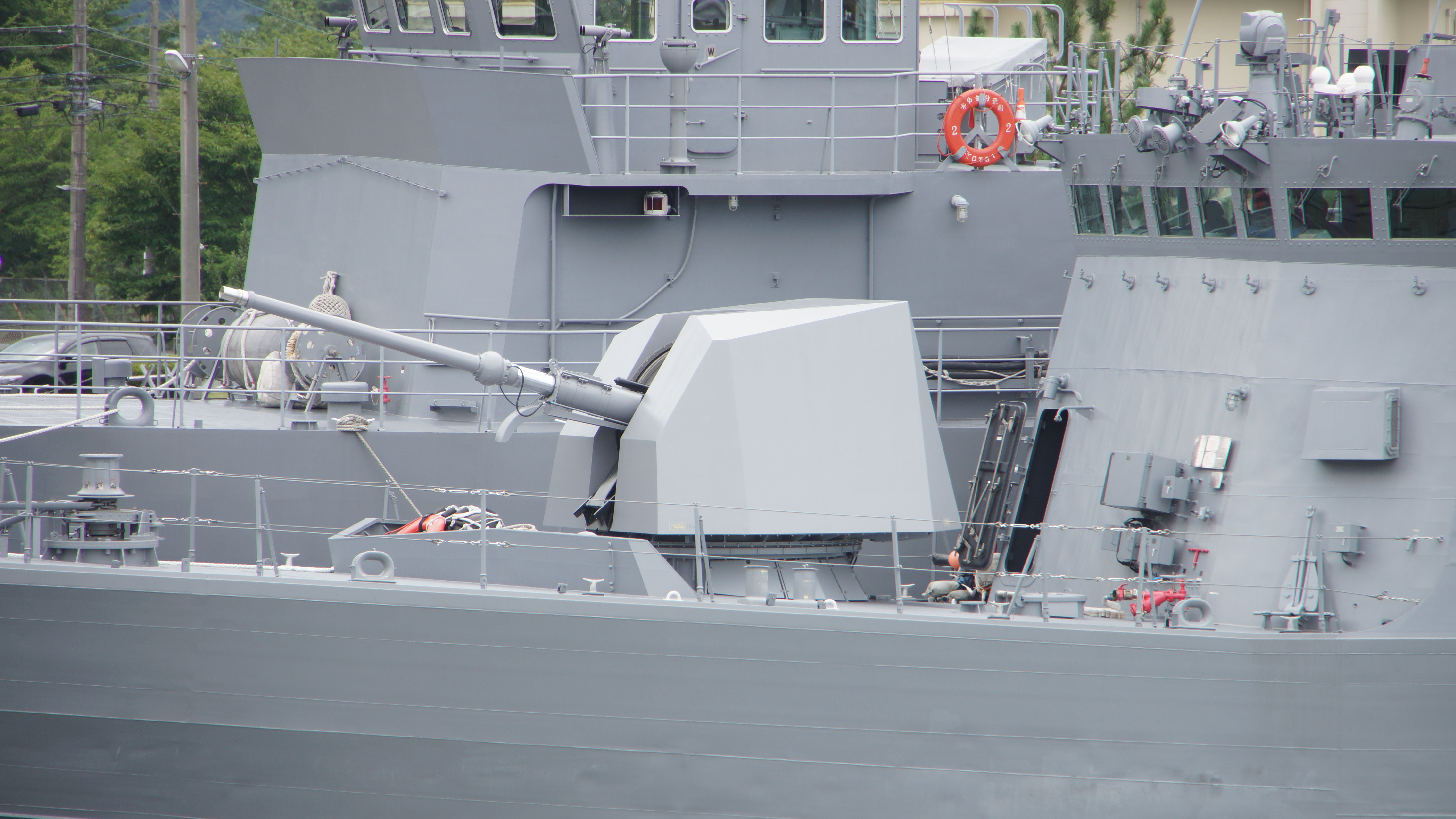 海上自衛隊 ミサイル艇うみたか（PG-828） 艦首上のOTOメララ76mm速射砲 左舷前面。舞鶴海上訓練指導隊の岸壁に繋留中。2017年7月29日 舞鶴航空基地の駐車場付近より撮影。